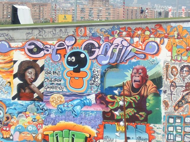 Photographie personnelle prise au Forum de Barcelone 2004 publiée sous licence GFDL. Fresque de tags sur un mur consacré (détail). Vincent Ramos